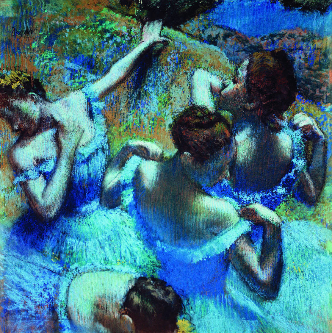 Знаменитая картина "Голубые танцовщицы" импрессиониста Эдгара Деги (Пастель)